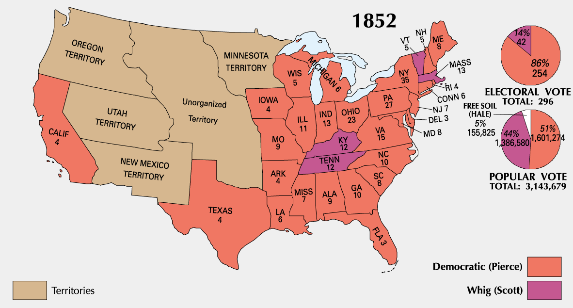 U.S. presidential election maps from the National Atlas of the United States See also: SVG maps1789 · 1792 · 1796 · 1800 · 1804 · 1808 · 1812 · 1816 · 1820 · 1824 · 1828 · 1832 · 1836 · 1840 · 1844 · 1848 · 1852 · 1856 · 1860 · 1864 · 1868 · 1872 · 1876 · 1880 · 1884 · 1888 · 1892 · 1896 · 1900 · 1904 · 1908 · 1912 · 1916 · 1920 · 1924 · 1928 · 1932 · 1936 · 1940 · 1944 · 1948 · 1952 · 1956 · 1960 · 1964 · 1968 · 1972 · 1976 · 1980 · 1984 · 1988 · 1992 · 1996 · 2000 · 2004 · 2008 · 2012 (this template: · view · discuss)